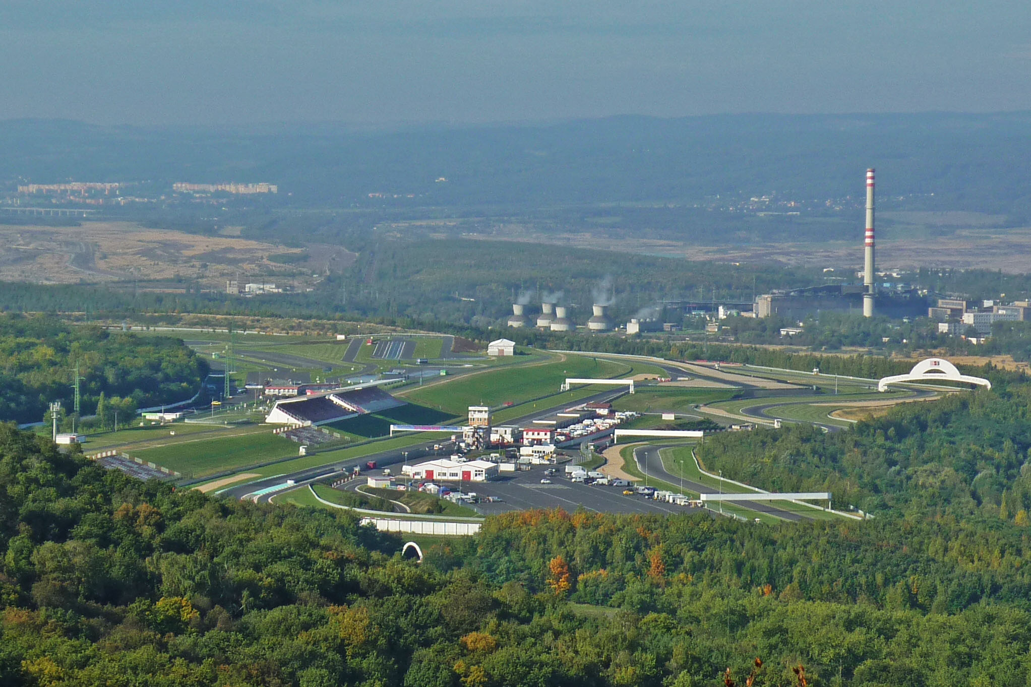 Blick vom Burgberg Hněvín auf das Autodrom Most